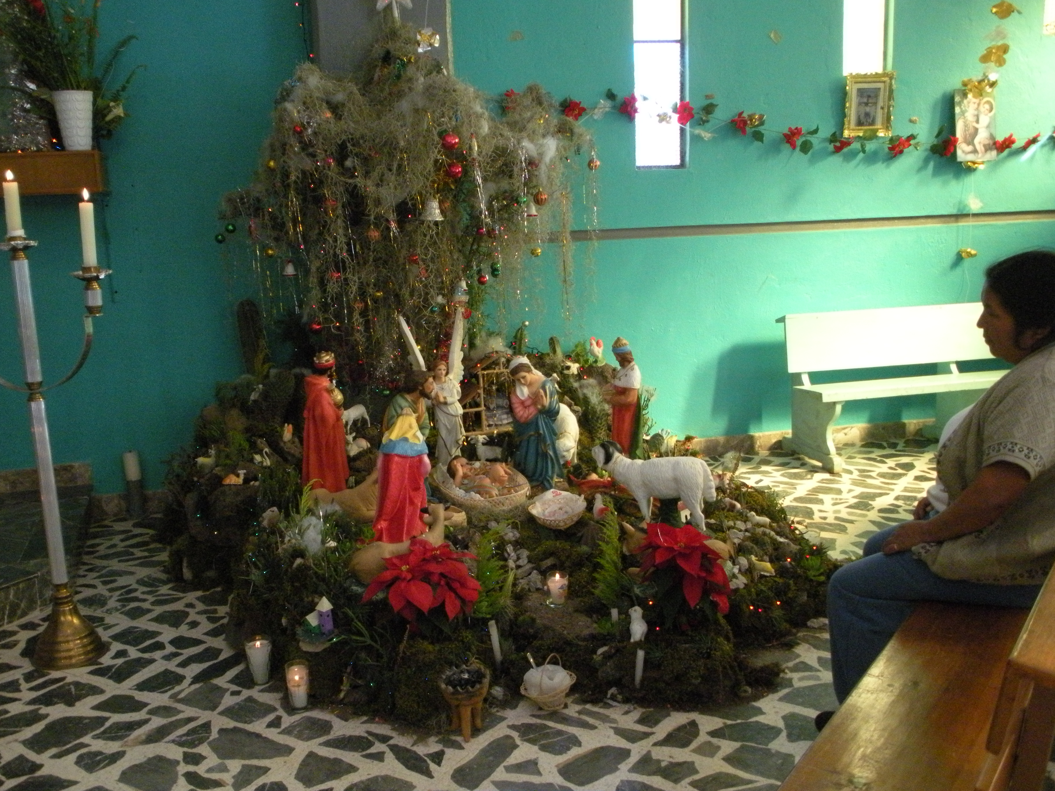 Navidad